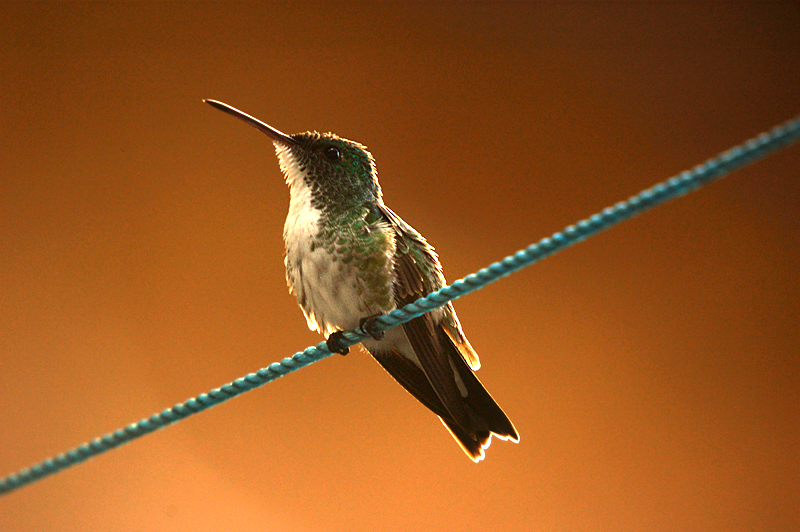 Amazilia leucogaster in Brazil.